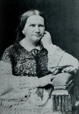 Мария Александровна Гагарина, ур. Стурдза (1820—1890)